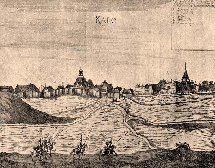 A Kállói vár építése az 1570-1573 közötti évekre tehető és Nagykálló látképe